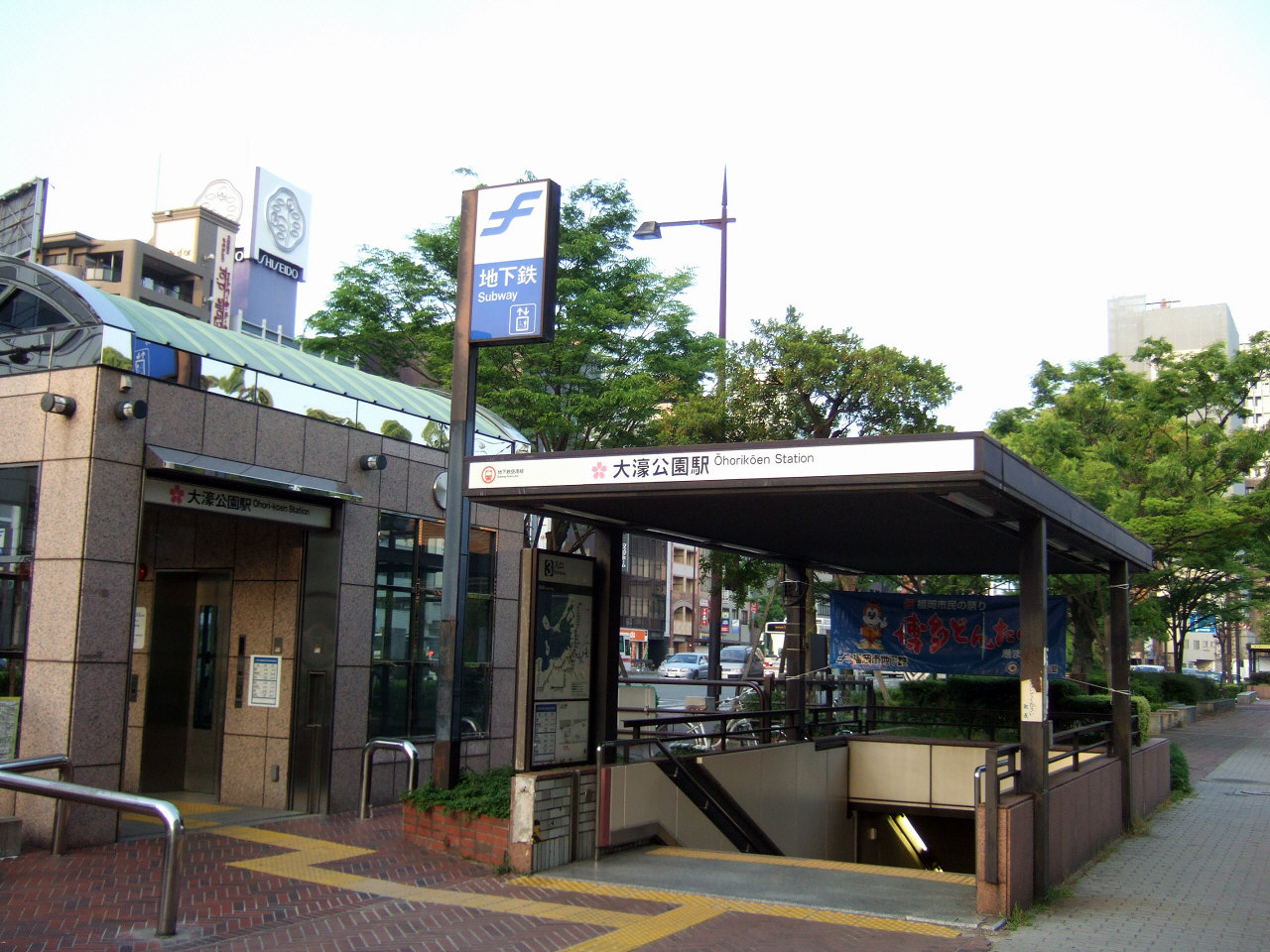 福岡市地下鉄大濠公園駅（Ohorikoen Station,Fukuoka City Subway）